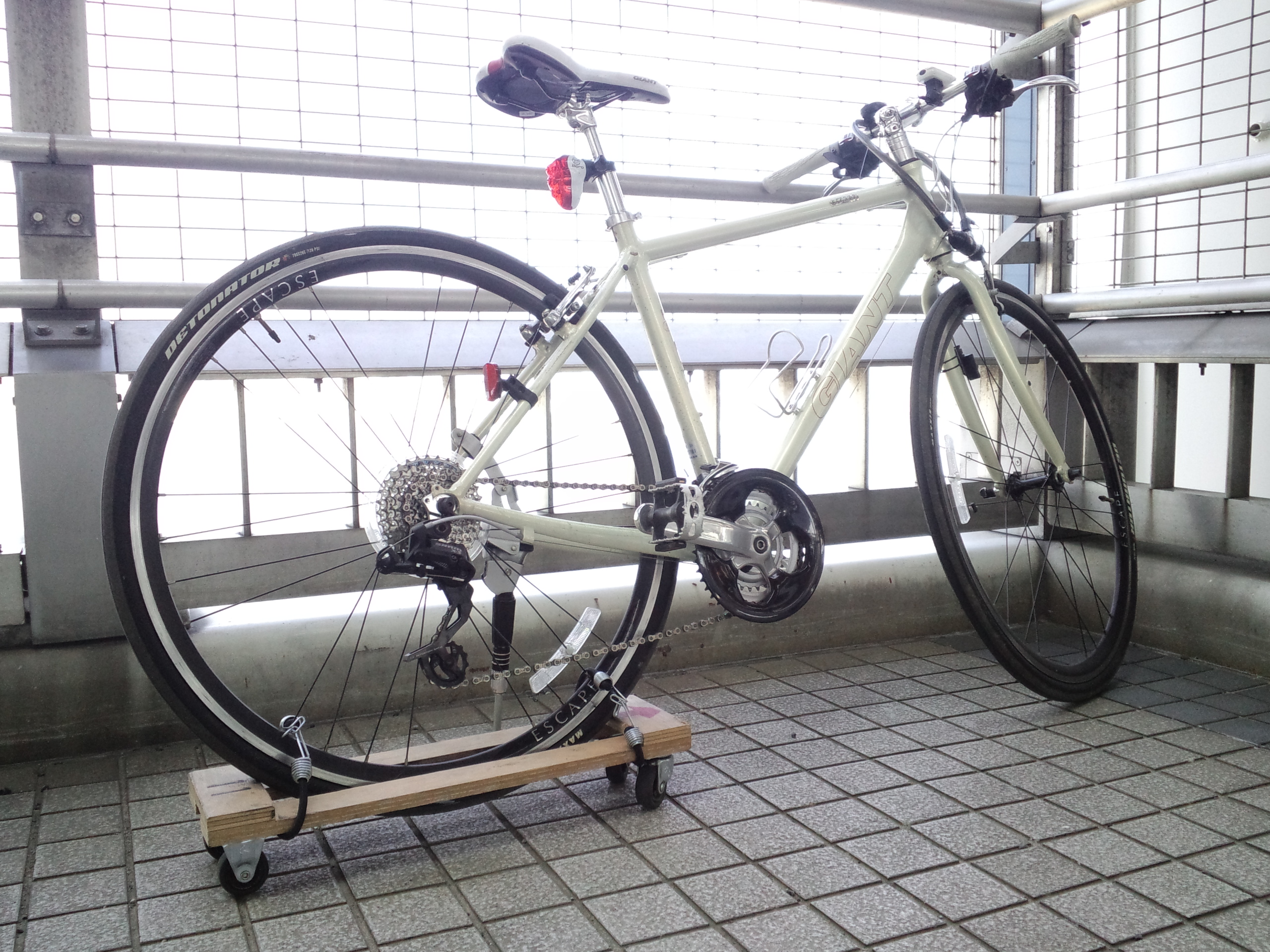 CA3H0107 [1] 但し、“台車”を付けて手で押して歩いて通行する事は出来ます。 2013年